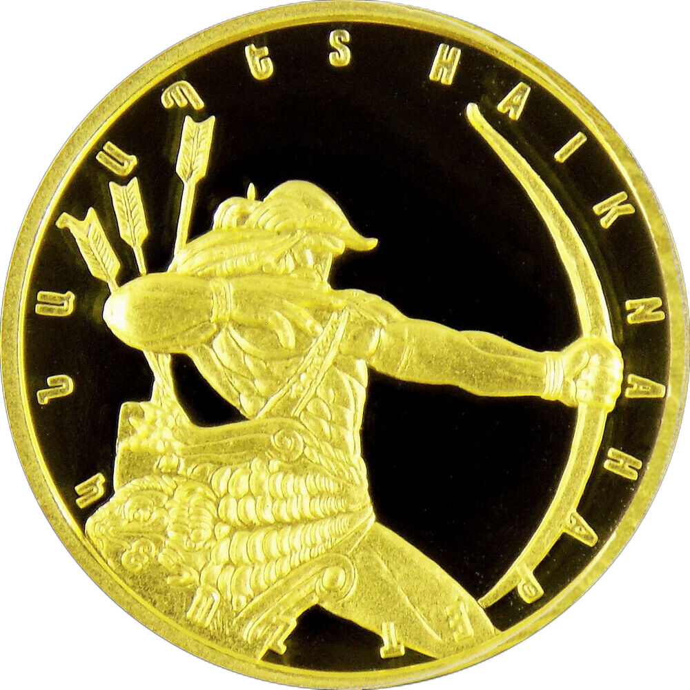 Памятная монета Армении 2007 года "Хайк" - 5000 драм - золото 900